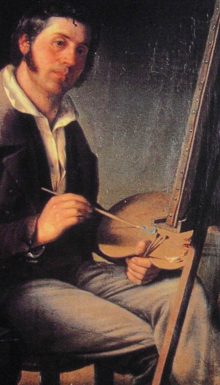 Selbstpotrtät des Elsässer Malers Sebastian Gutzwiller, 1838.